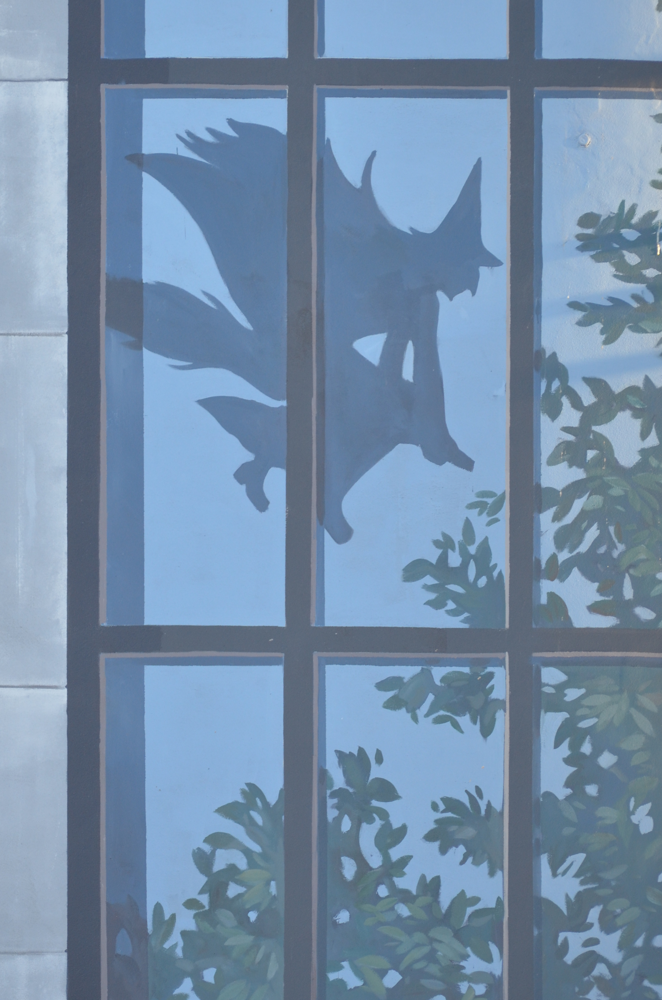 Namur (Belgique) - la fresque des Wallons après la restauration de 2018. Macrale.